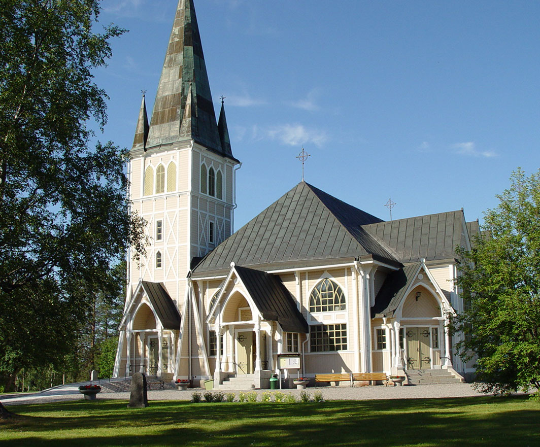 Arvidsjaur church from 1902